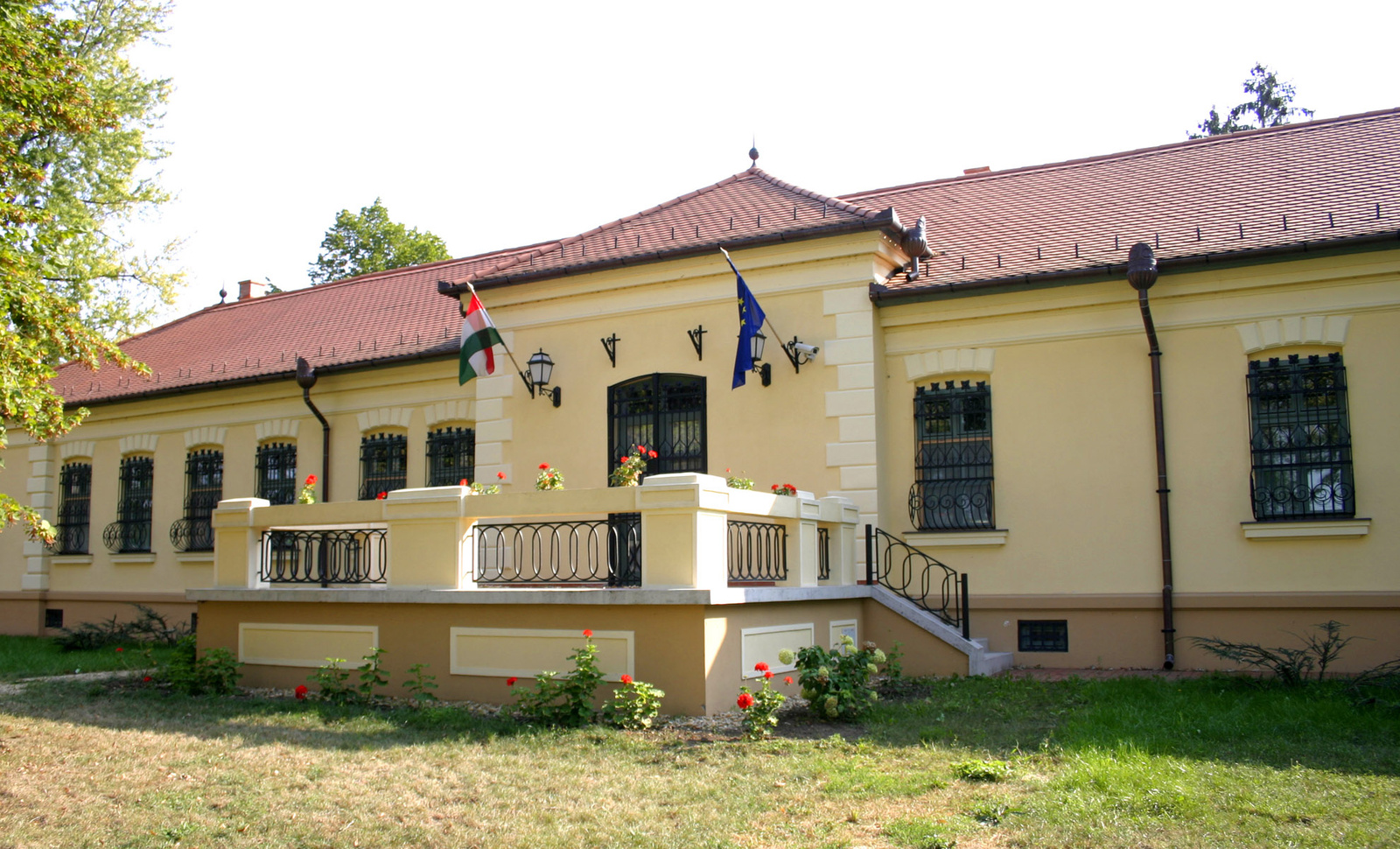 Wenckheim-Almássy-kastély (Gyula, Széchenyi u. 69., 71-76.) This is a photo of a monument in Hungary. Identifier: 16240